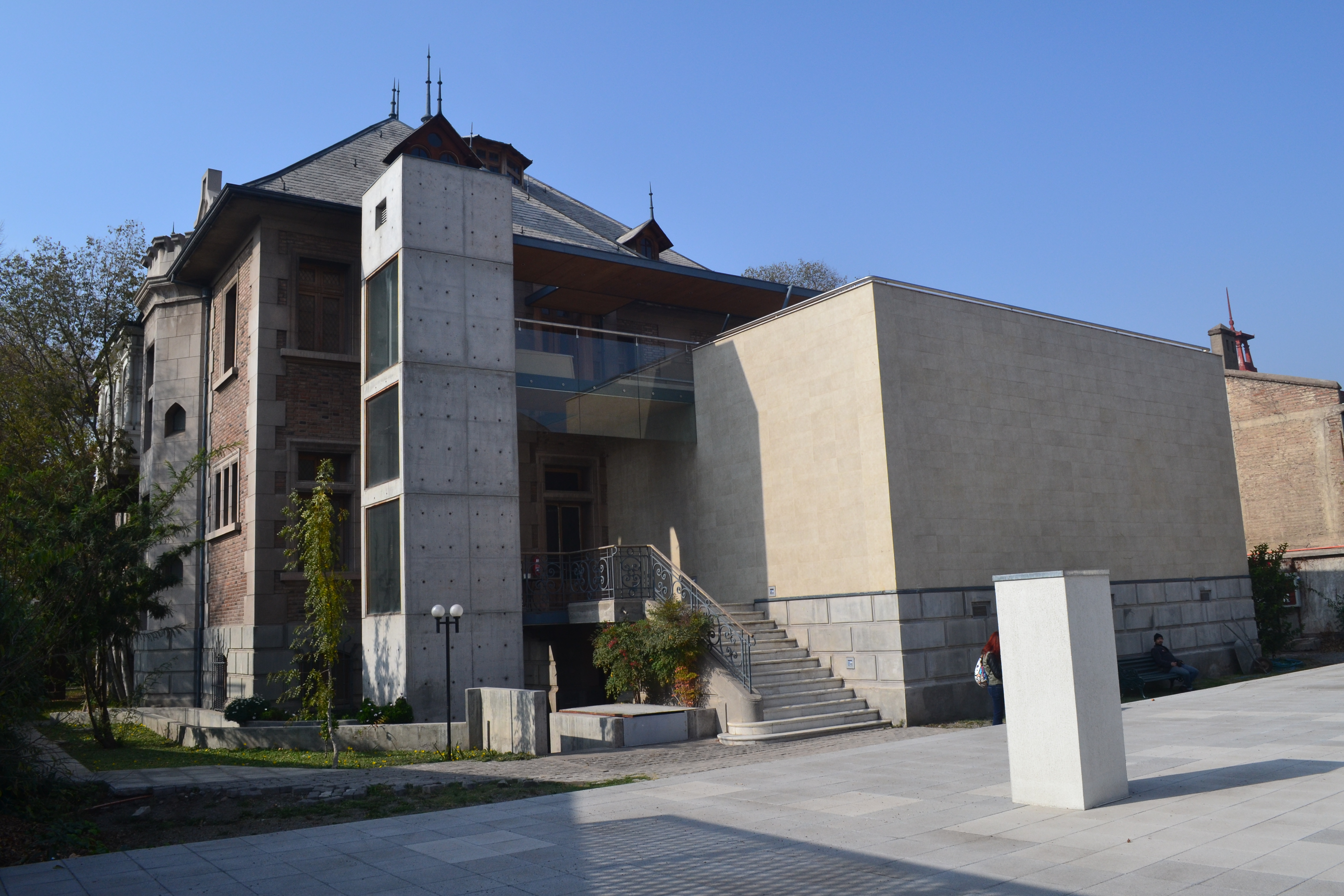 Vista posterior, desde el patio poniente del Museo de la Solidaridad Salvador Allende